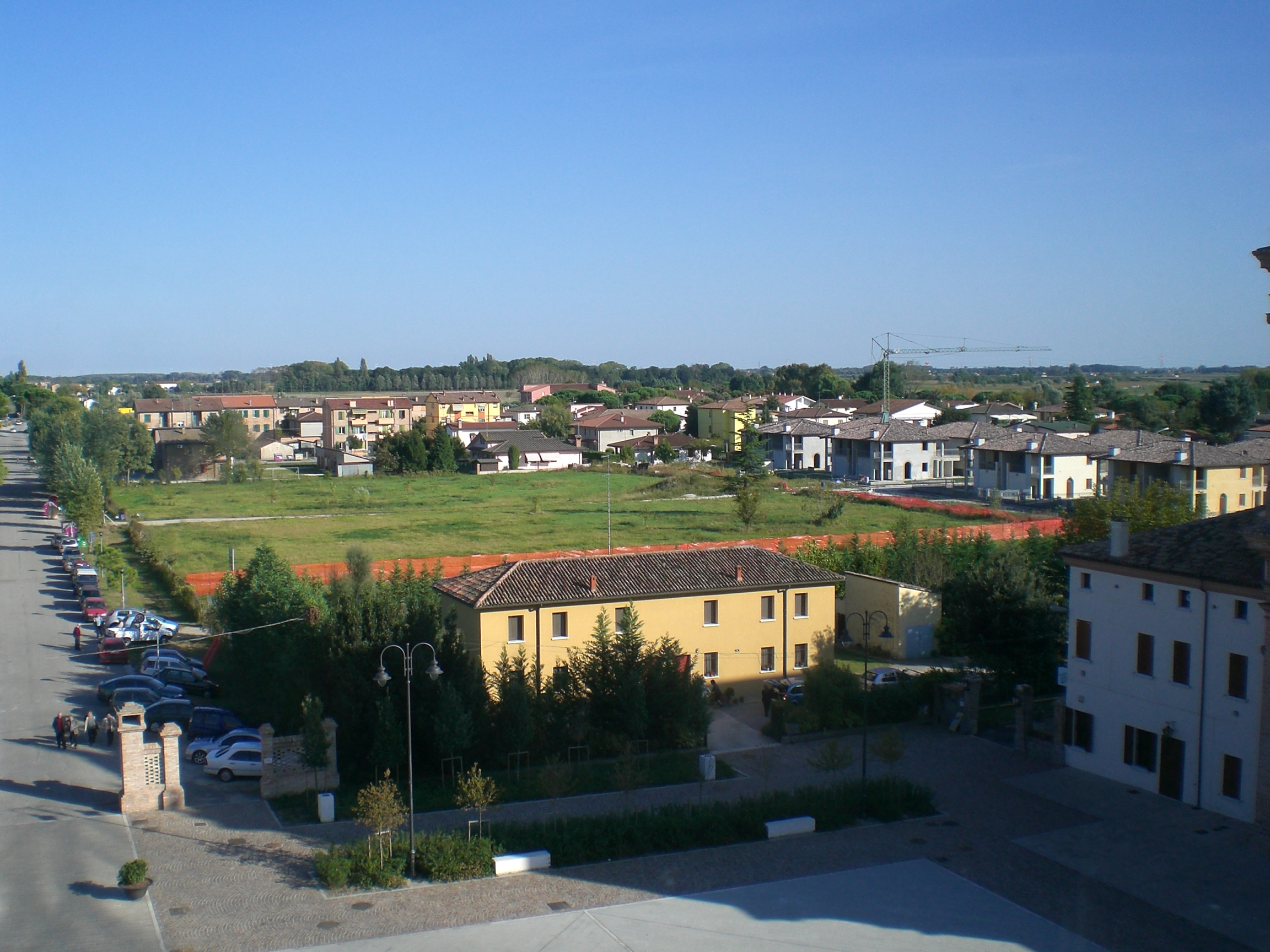 Panorama